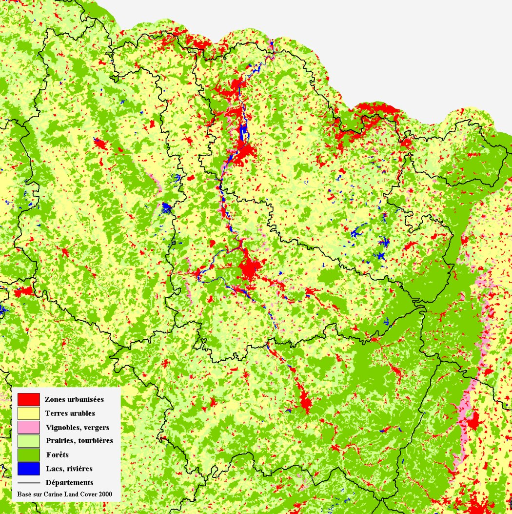 Occupation des sols en Lorraine en 2000